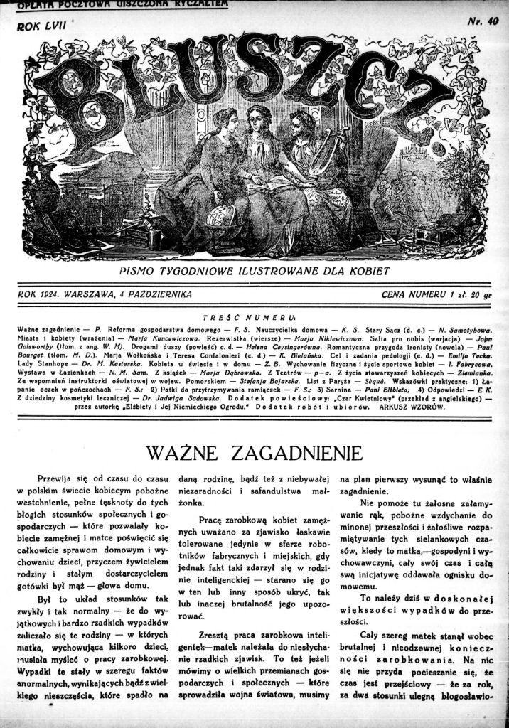 okładka tygodnika Bluszcz. Pismo tygodniowe ilustrowane dla kobiet. 1924.10.04 R.57 nr40